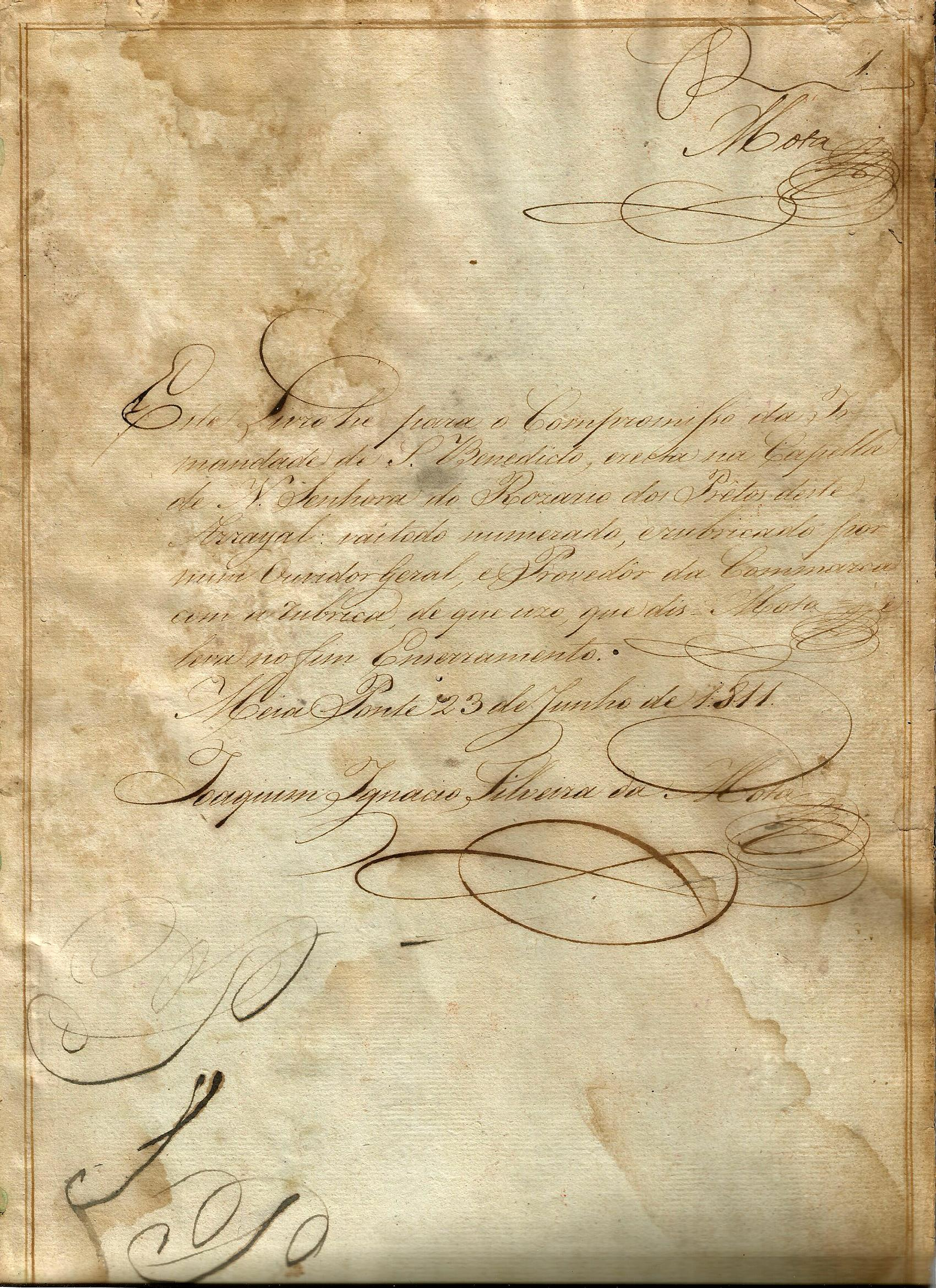 Termo de abertura do Livro de Compromisso da Irmandade de São Benedito, no qual se lê: Este Livro he para o Compromisso da Irmandade de S. Benedicto eretha na Capella de N. Senhora do Rozario dos Prêtos deste Arrayal: vai todo enumerado, e rubricado por mim Ouvidor Geral, e Provedor da Commarca com a rubrica, de que uso, que diz Mota e leva no fim Encerramento. Meia Ponte 23 de Junho de 1811.Joaquim Ignacio Silveira da Mota.